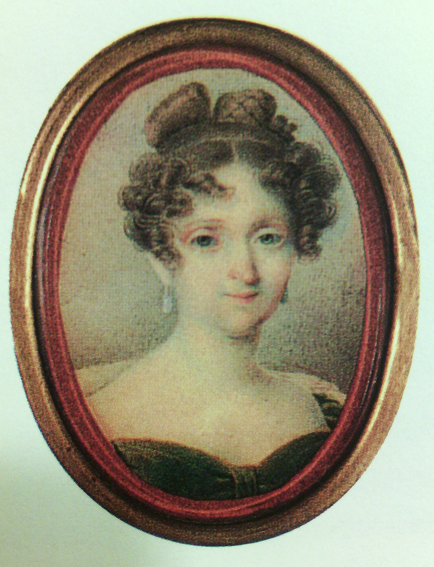 Евдокия Дмитриевна Небольсина, урож. княжна Львова (1796-1825), жена сенатора Николая Андреевича Небольсина (1785—1846).